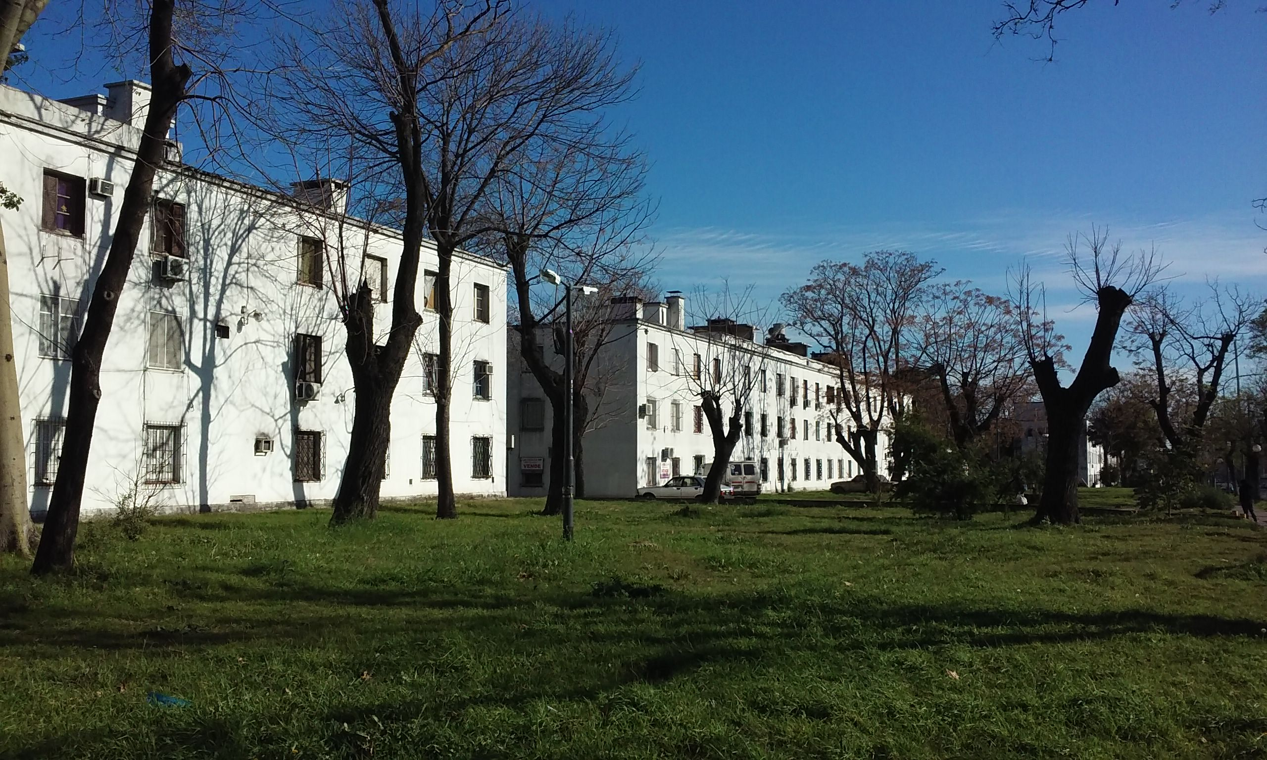 Edificios del barrio Los Perales / Manuel Dorrego, barrio de Mataderos, en Buenos Aires. Desde Avenida Lisandro de la Torre.